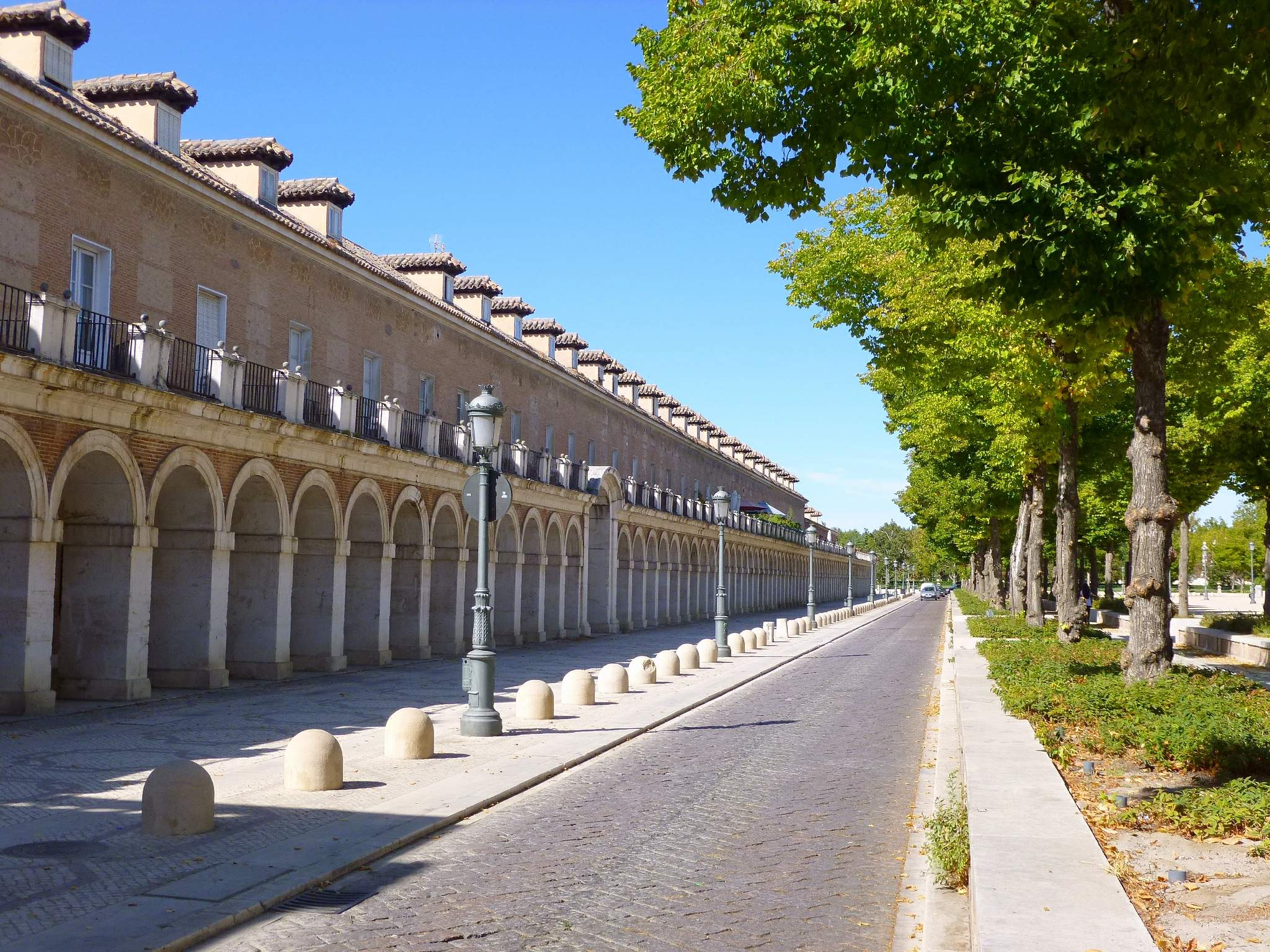 Casa de Caballeros y Oficios, Real Sitio de Aranjuez